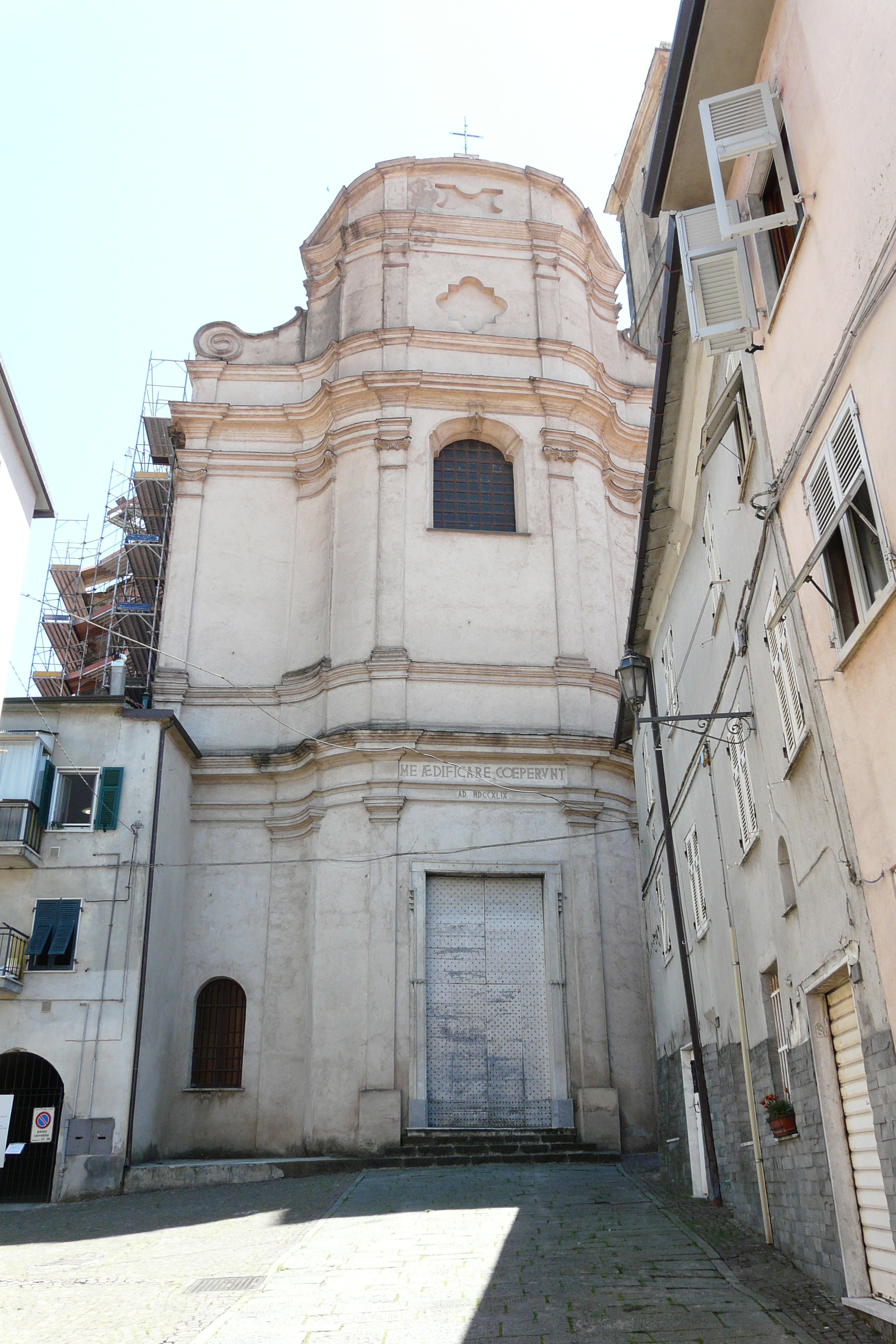 Chiesa di Santo Stefano, Santo Stefano di Magra, Liguria, Italia